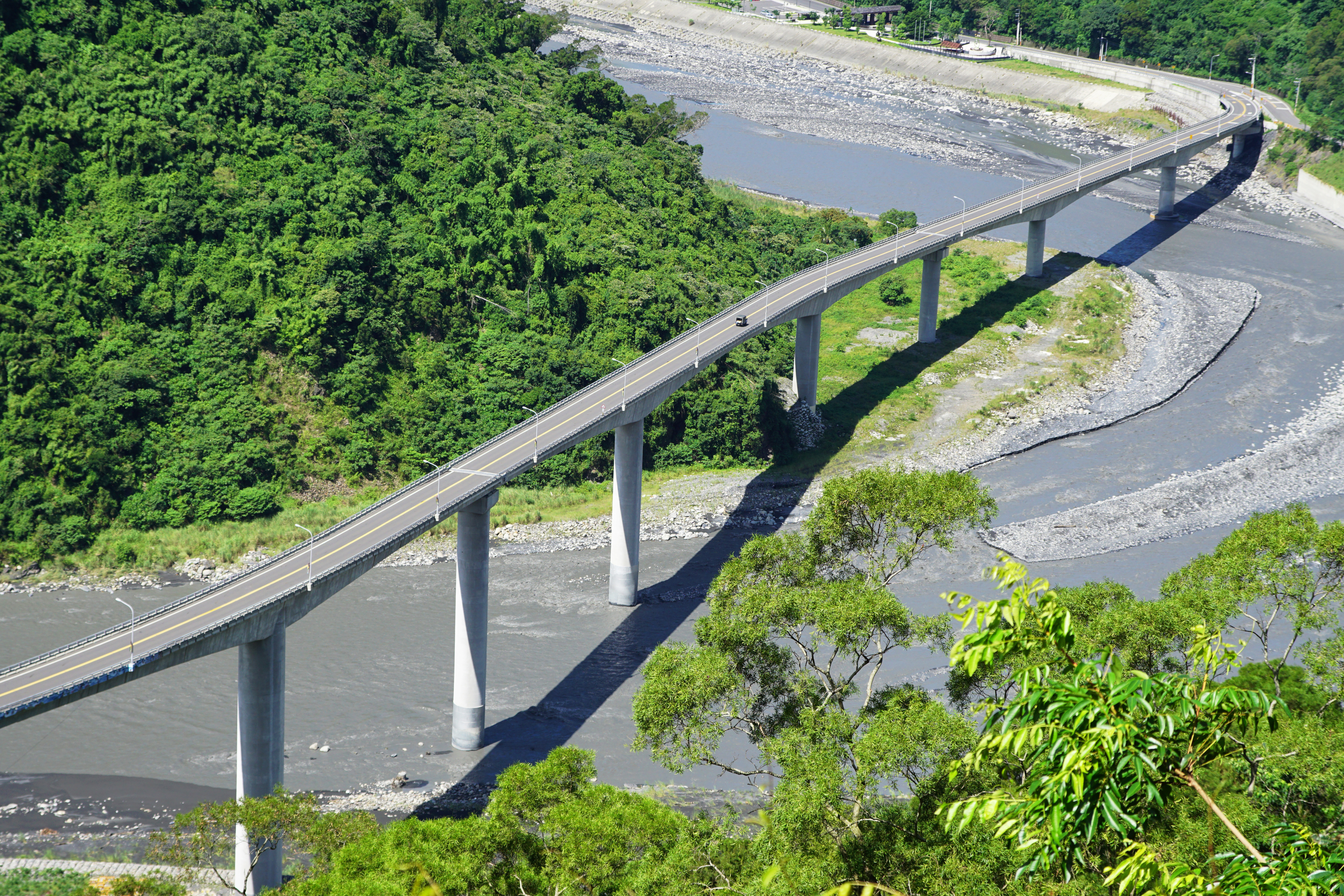 中文（台灣）: 得樂日嘎大橋